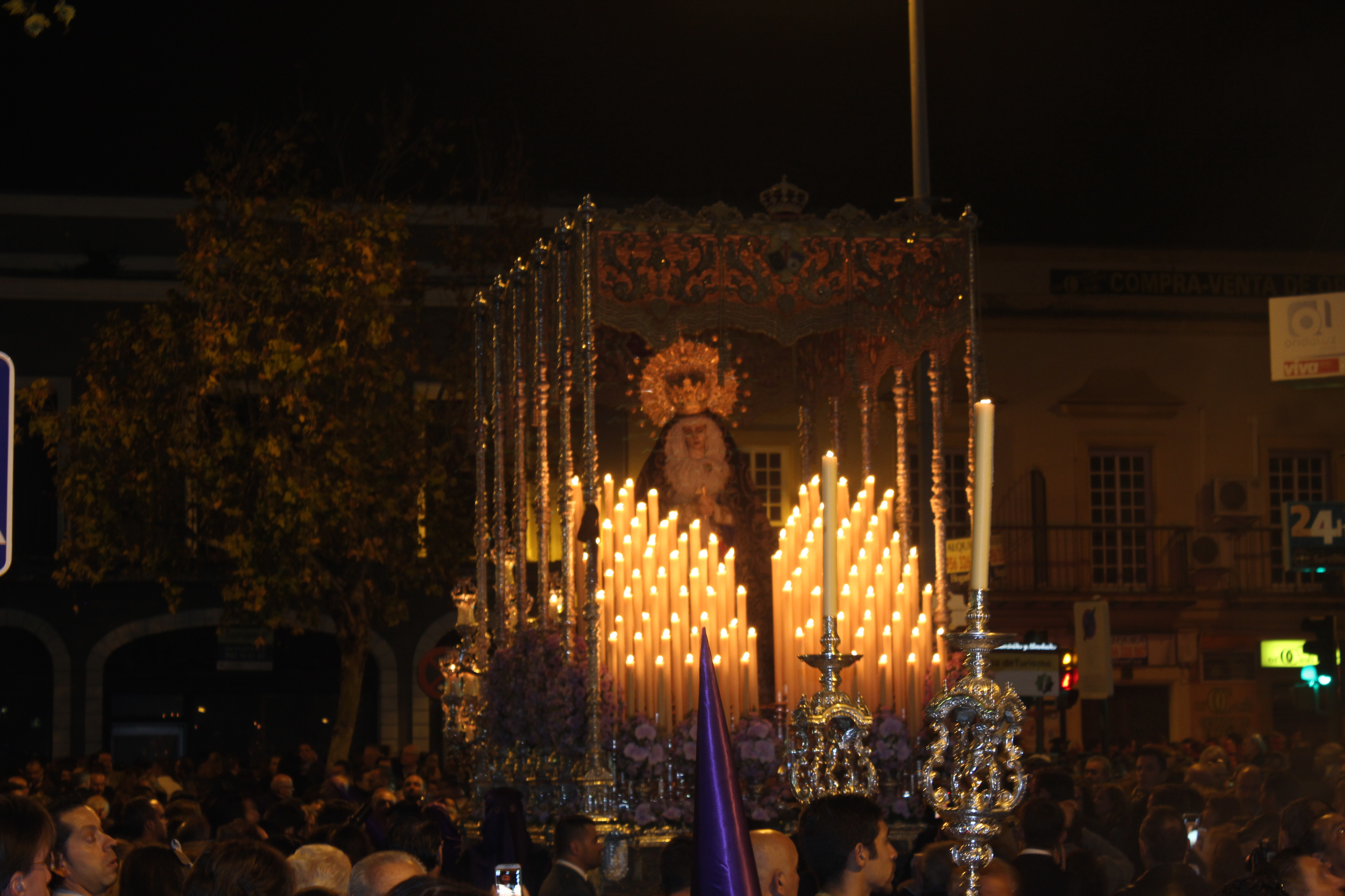 Hermandad de la Soledad procesionando en la Semana Santa de Jerez de la Frontera 2016 (Andalucía, España) This is a photography of a Folklore festival in Spain (Wikidata id Q6124533).